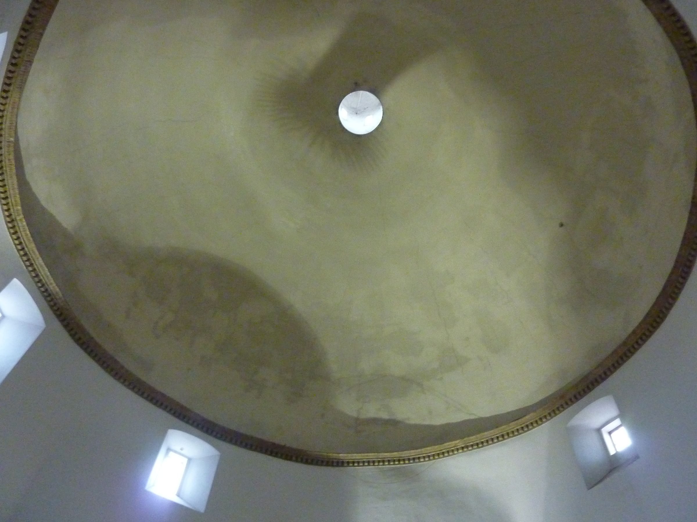 San Flaviano